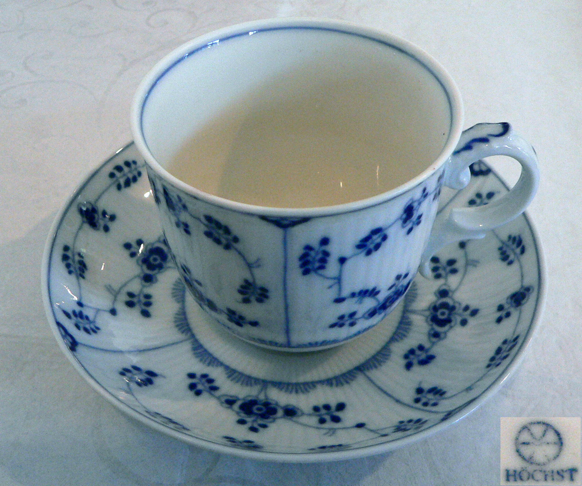 Tasse aus Höchster Porzellan. Modell Amalienburg. Unten rechts das Firmenzeichen vom Tassenboden.